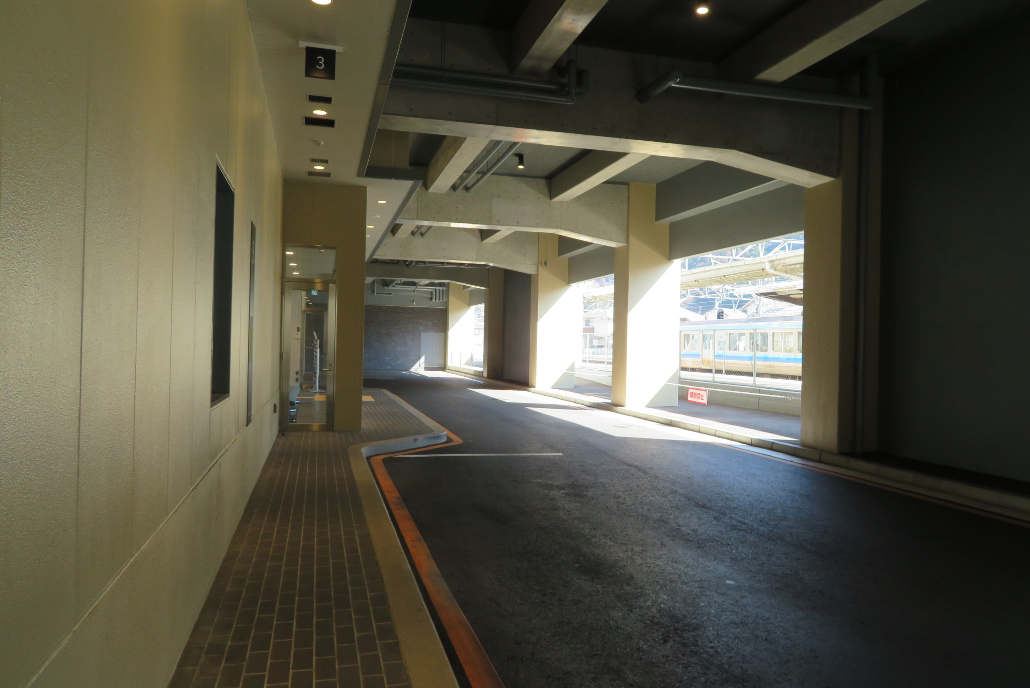 高梁市複合施設1階にある高梁バスセンターの3番のりば